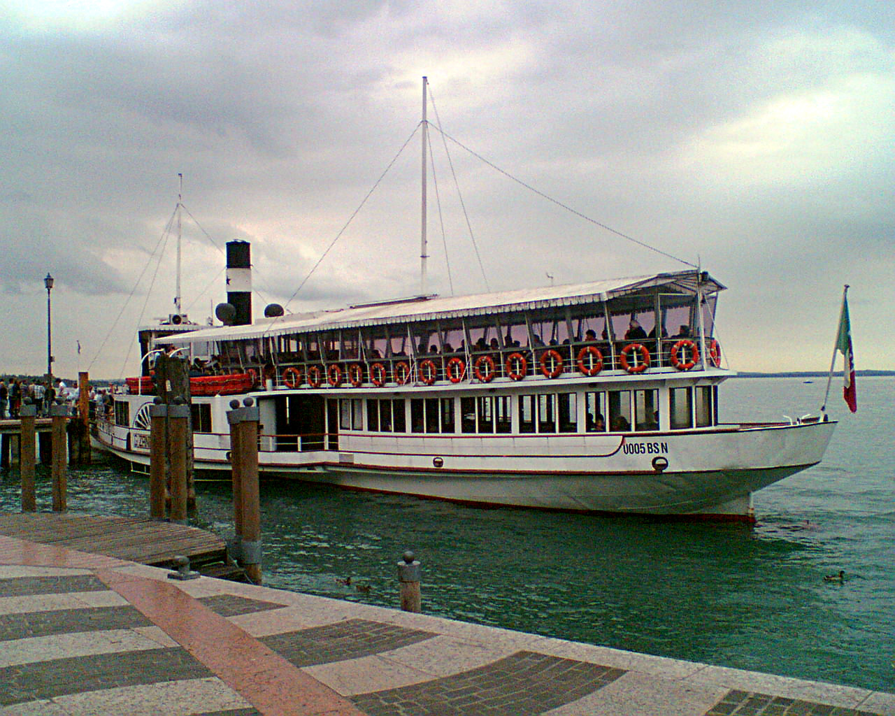 motonave all'attracco al molo di Lazise